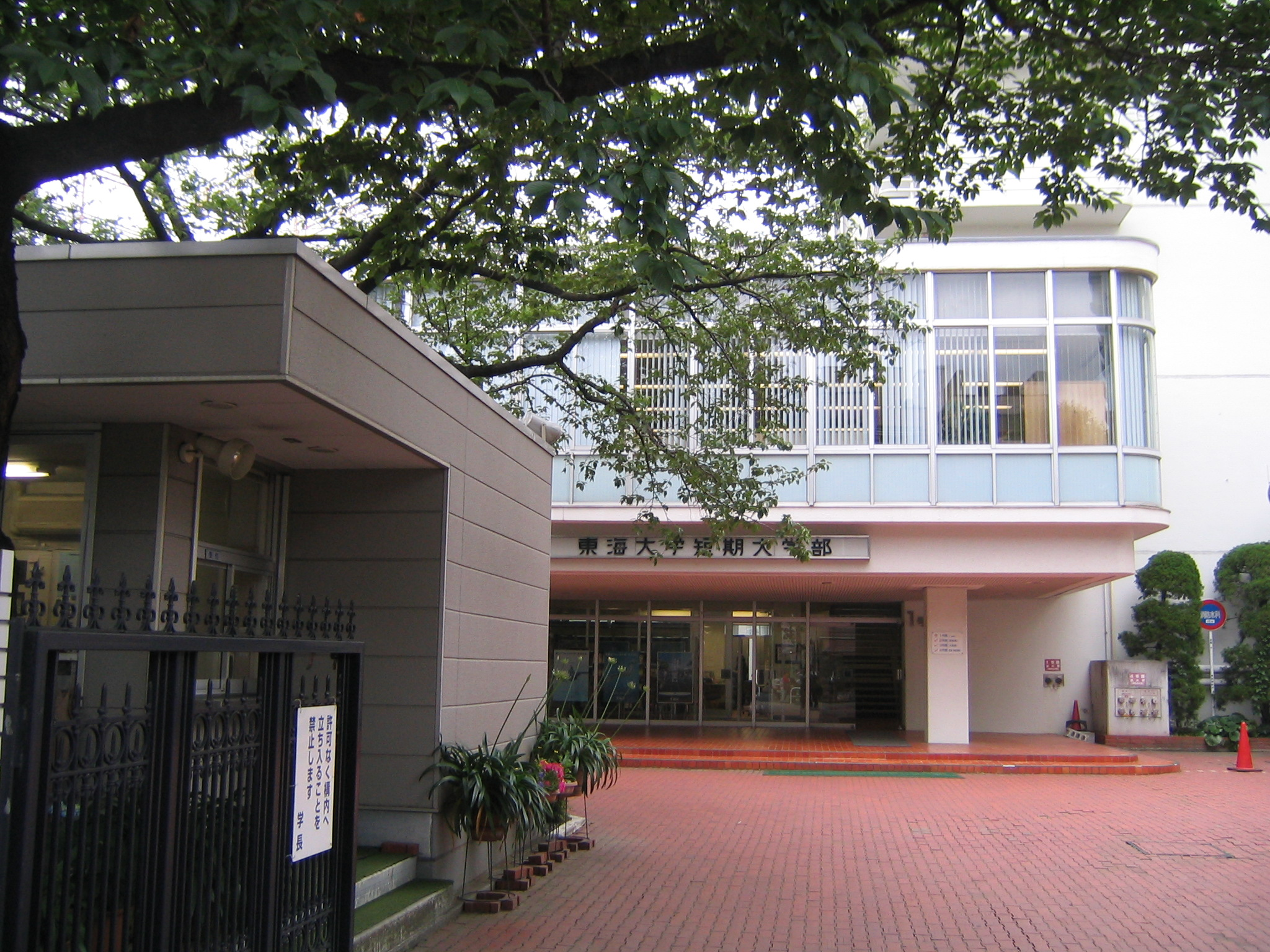 東海大学短期大学部高輪校舎